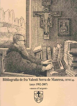 Portada de la Bibliografia de Fra Valentí Serra de Manresa. Dibuix original de J. Oliver-Bonjoch